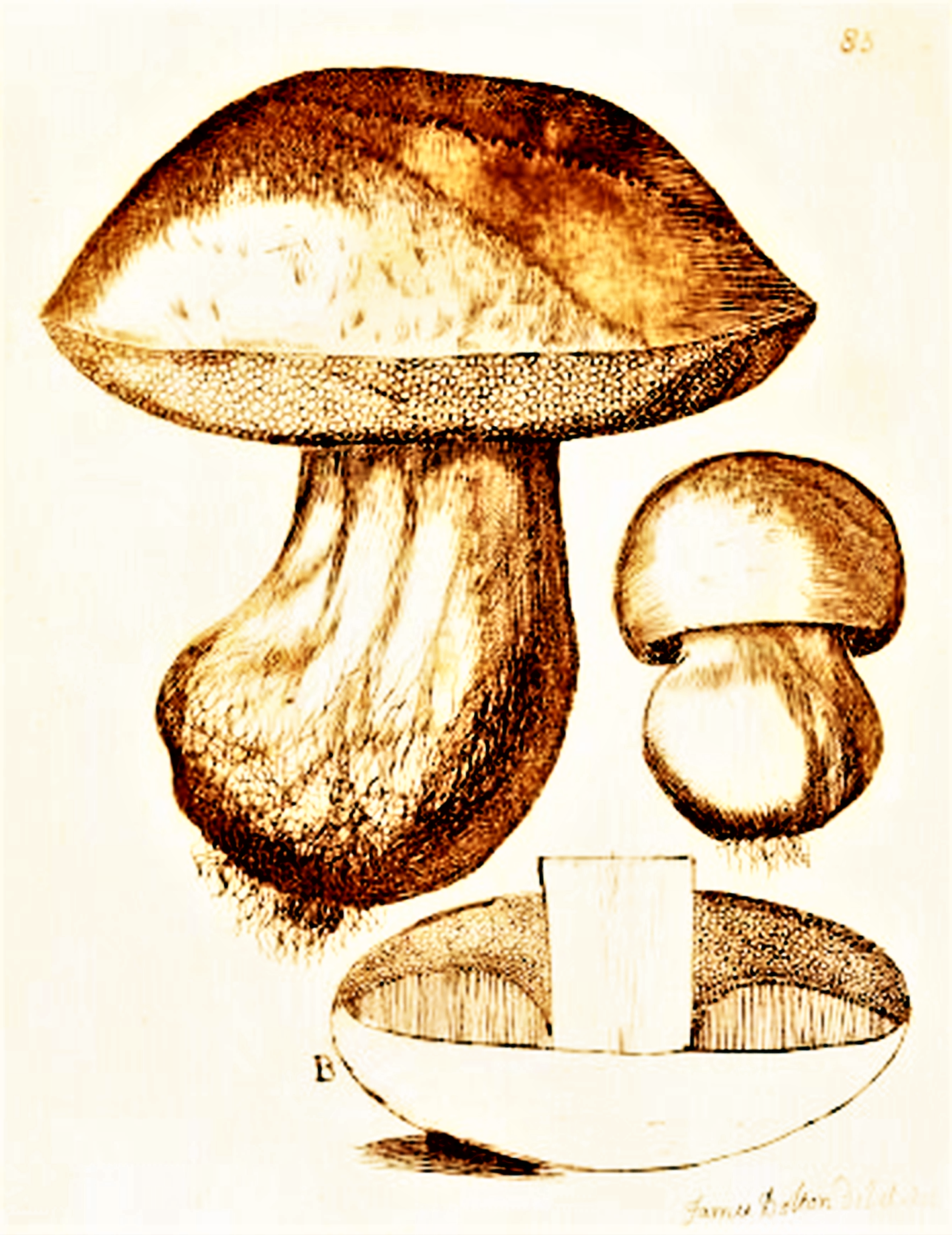 James Bolton: Boletus stipetatus (1789)